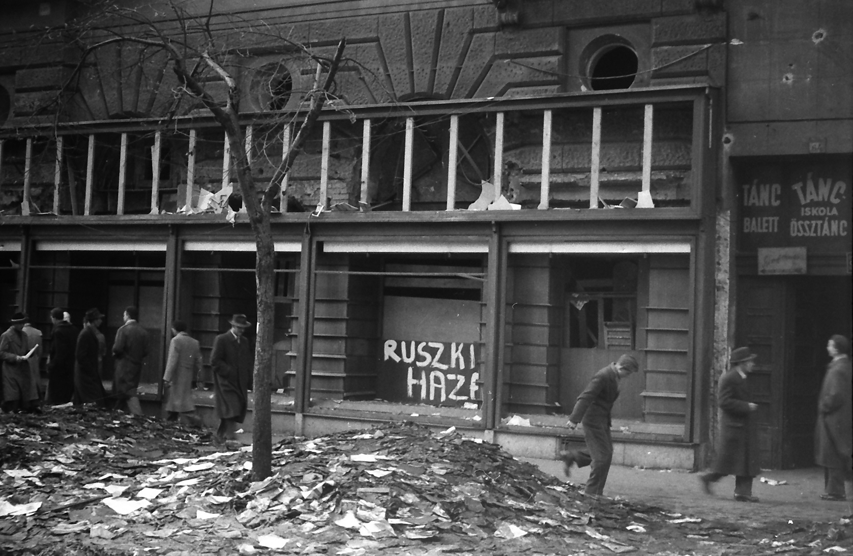 Teréz (Lenin) körút - Dohnányi Ernő (Szófia) utca sarkán álló épület. Location: Hungary, Budapest VI. Tags: label, Budapest, revolution Title: Teréz (Lenin) körút - Dohnányi Ernő (Szófia) utca sarkán álló épület.